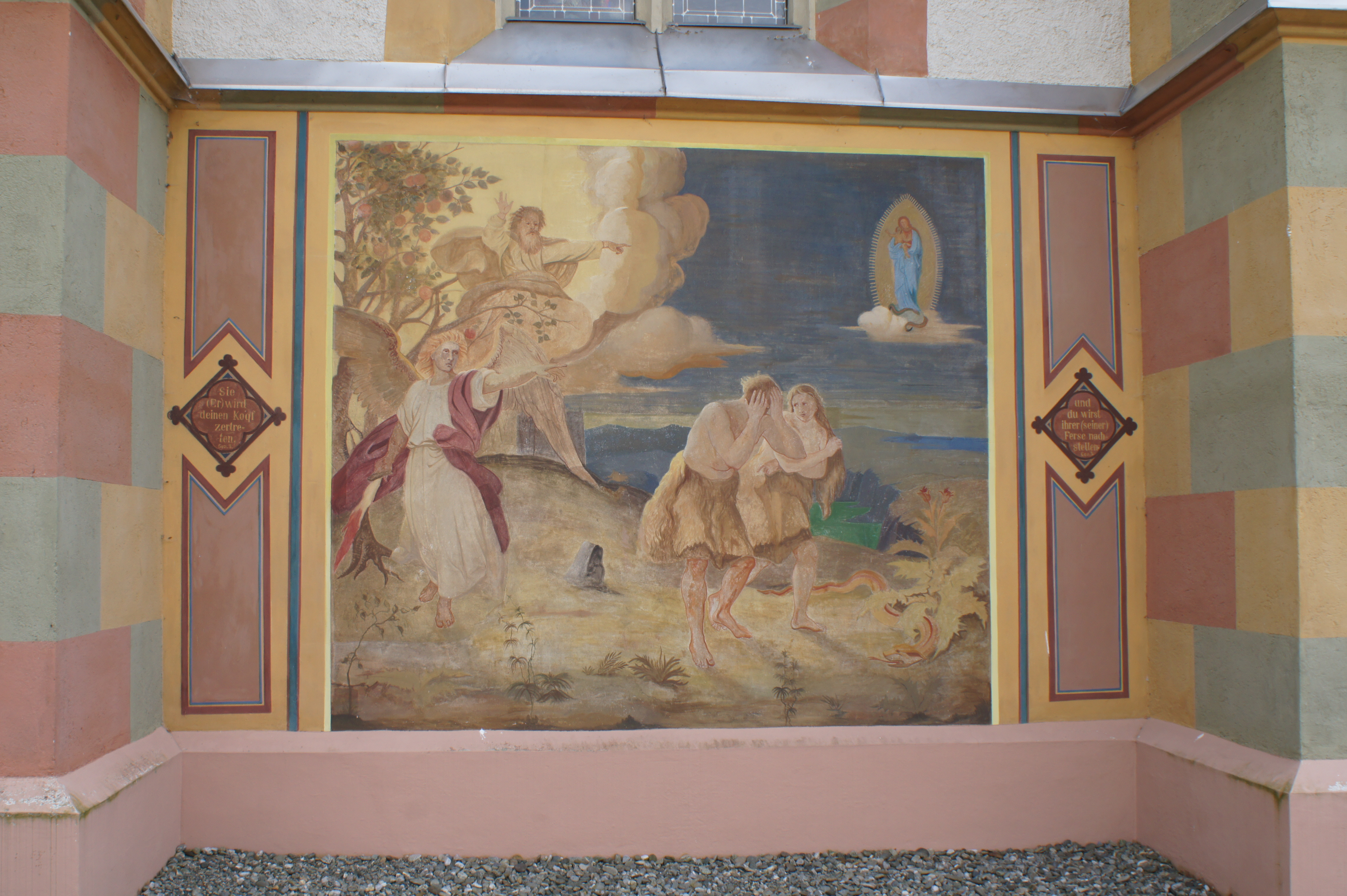 Kath. Pfarrkirche Maria Himmelfahrt